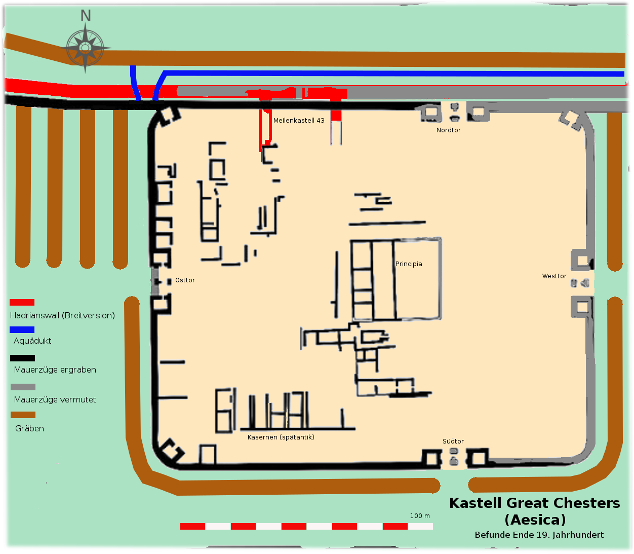 Grabungsplan des Kastell Great Chesters (Aesica), Hadrianswall (GB), Befunde bis Ende des 19. Jahrhunderts.